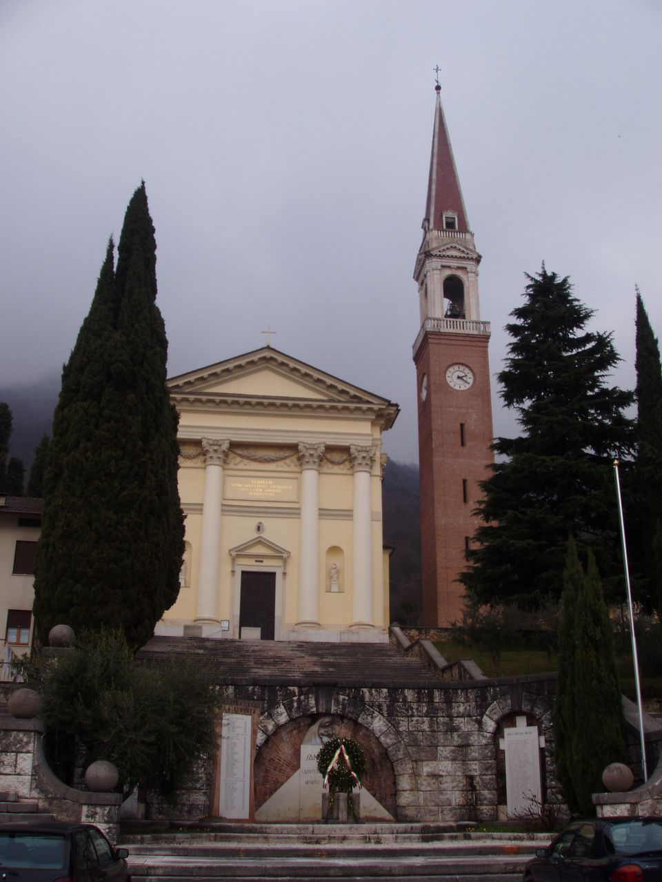 Santorso: la chiesa parrocchiale di Santa Maria Immacolata.